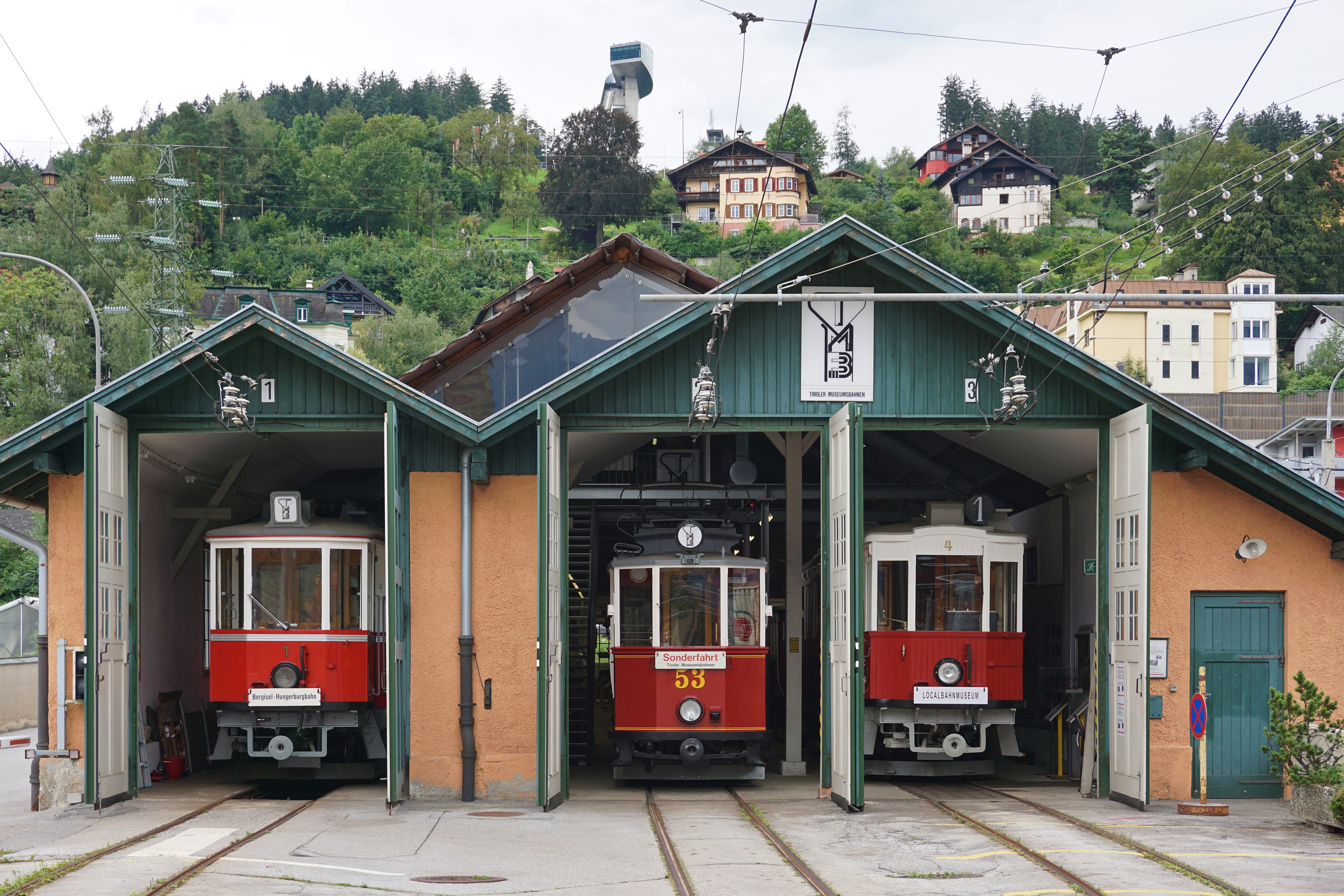 Remise der Tiroler Museumsbahnen (Remise der Stubaitalbahn 1904–1983) This media shows the remarkable cultural object in the Austrian state of Tyrol listed by the Tyrolean Art Cadastre with the ID 68583. (on tirisMaps, on tirisdienste.at, pdf, more images on Commons)